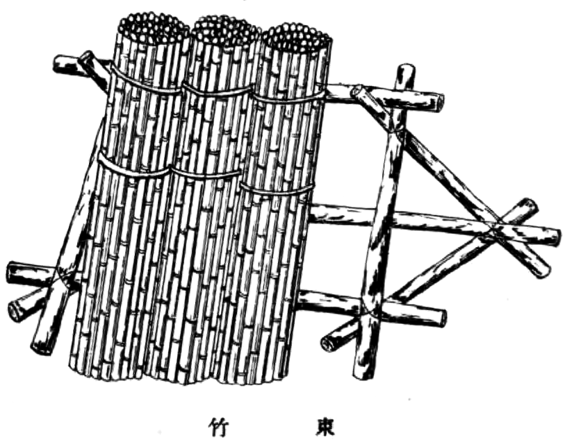 竹束。戦国時代の防具。